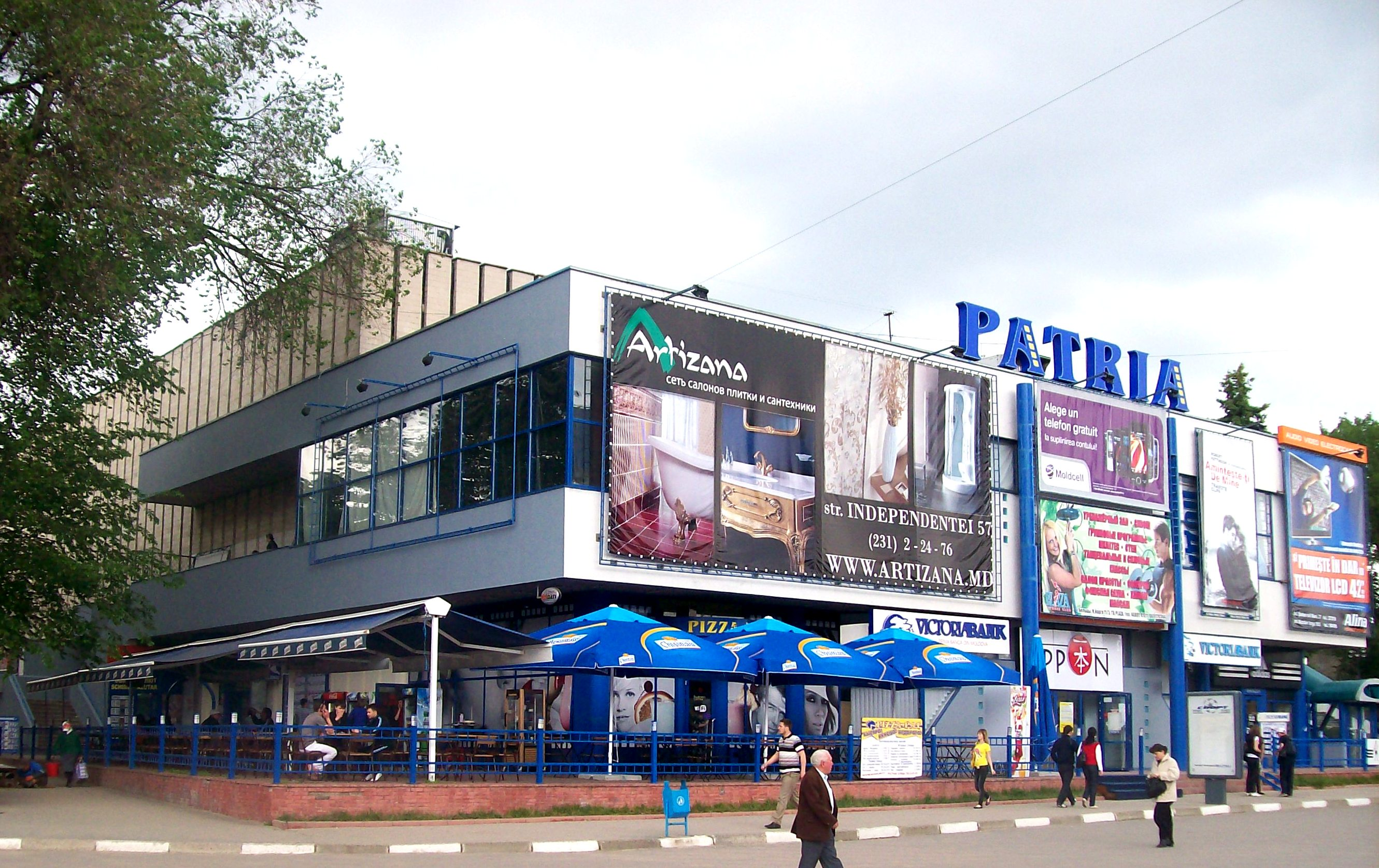 Cinema Patria Bălți